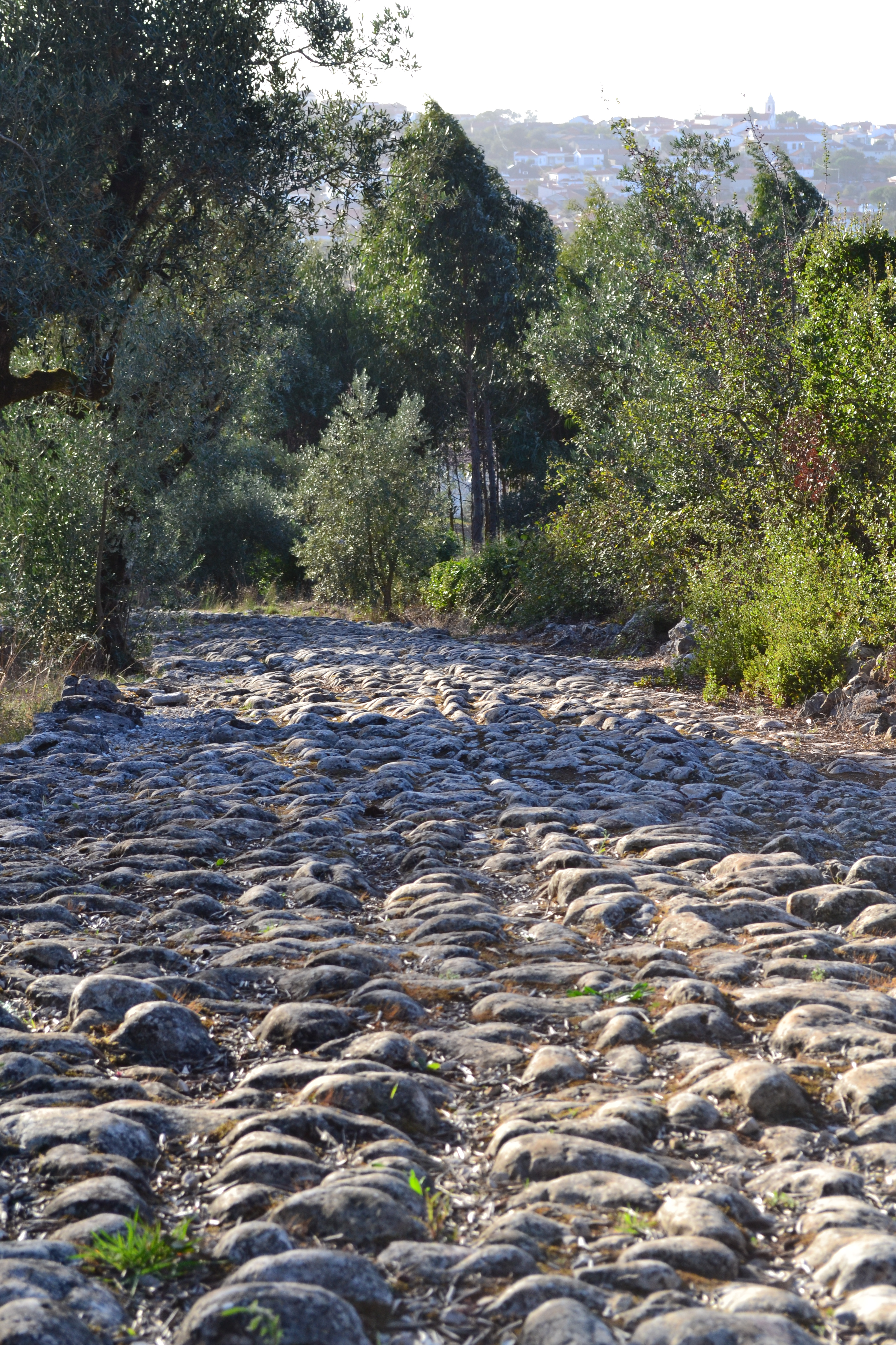 Troço de Via Romana em Alqueidão da Serra This file was uploaded for Wiki Loves Monuments in Portugal with the unique identifier 73614.